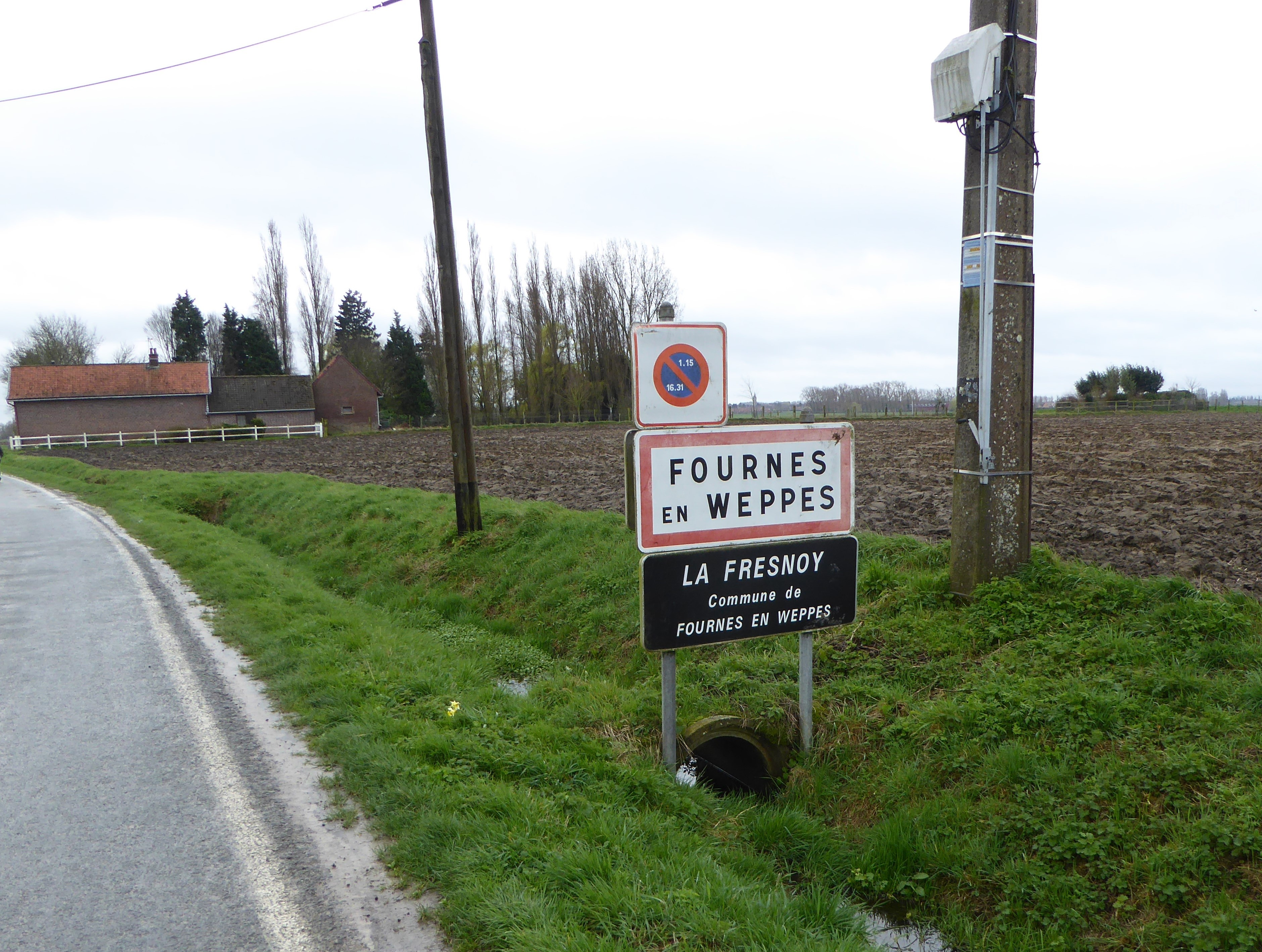 City limit sign Fournes-en-Weppes, France